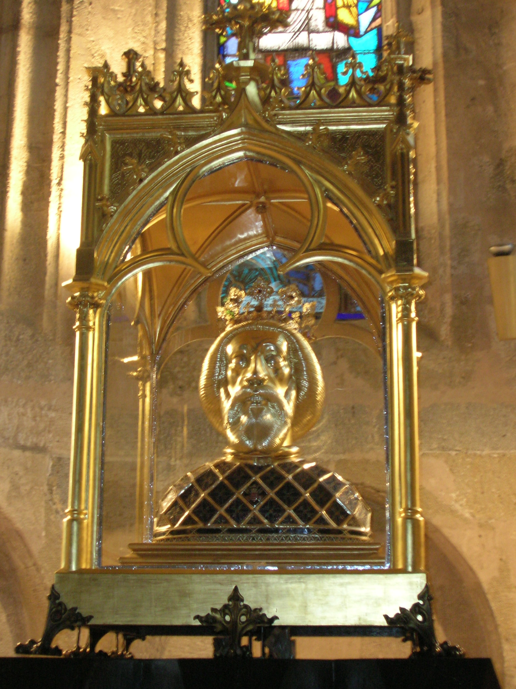 Győr, Szt. László